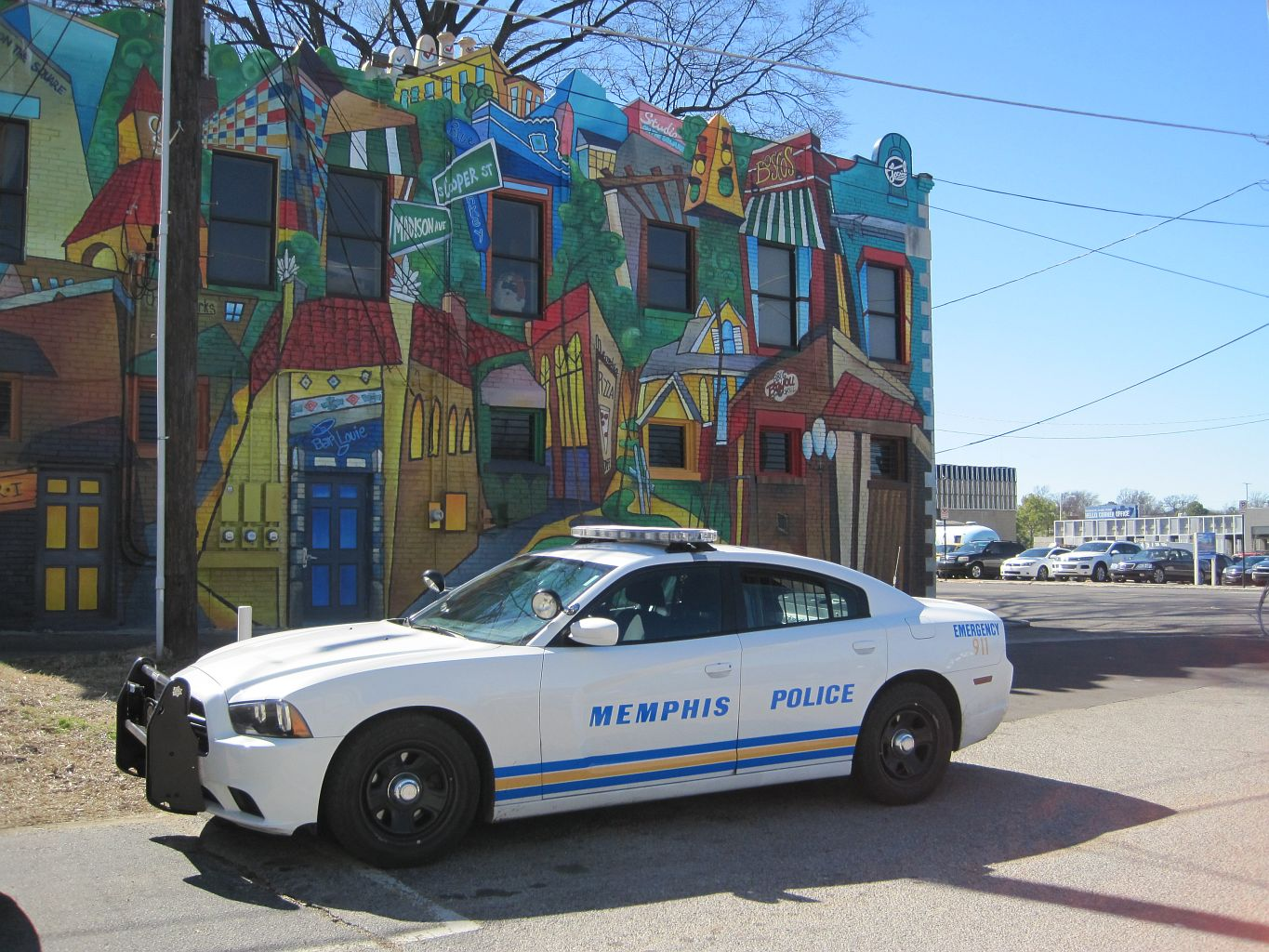 Memphis, Tennessee